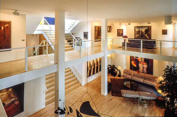 Haus Ulla und Heiner Pietzsch, 1993